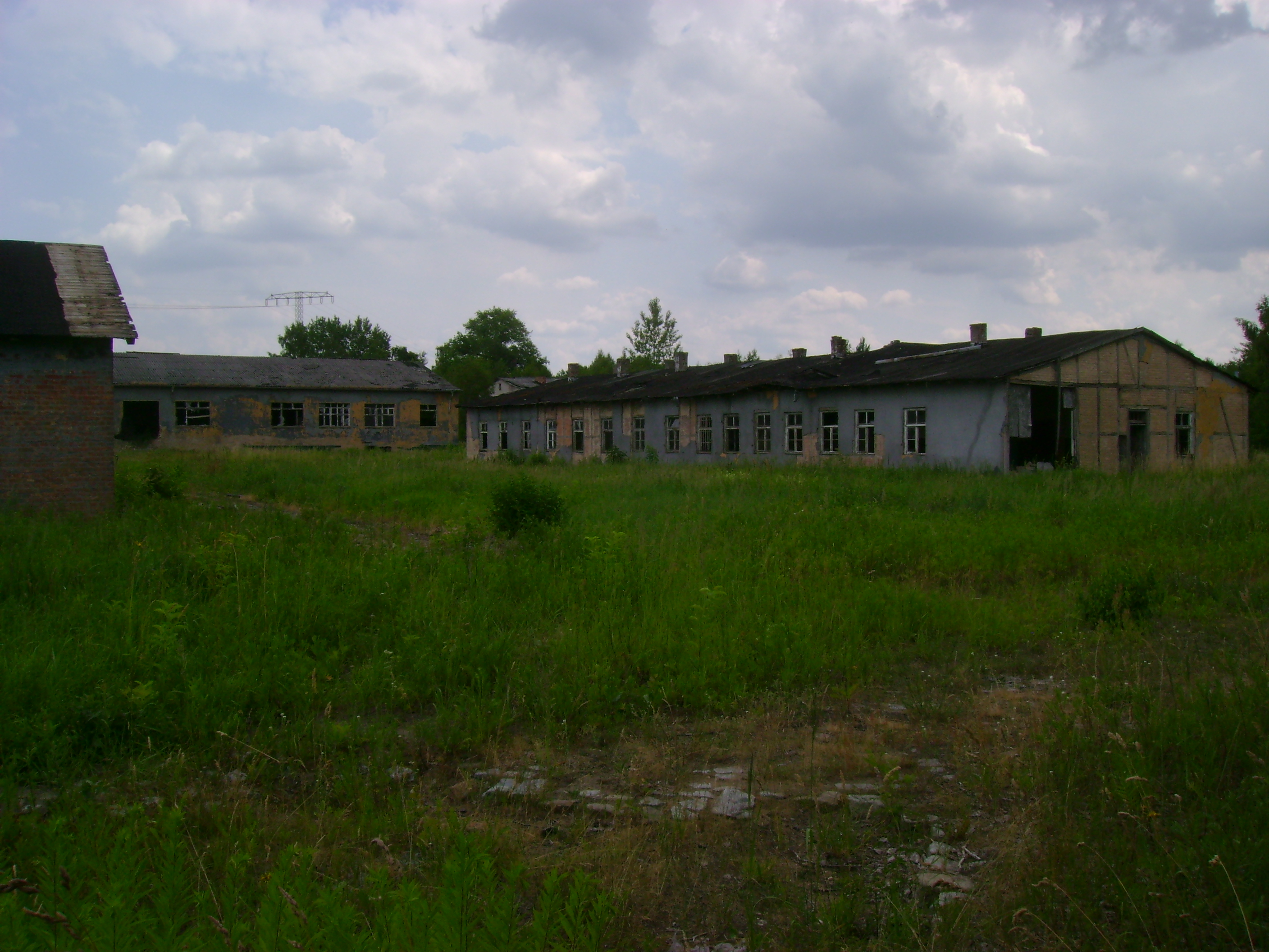 Ehemalige Kommandanturgebäude des Kriegsgefangenenlagers Stalag III A in Luckenwalde Zapfholzweg